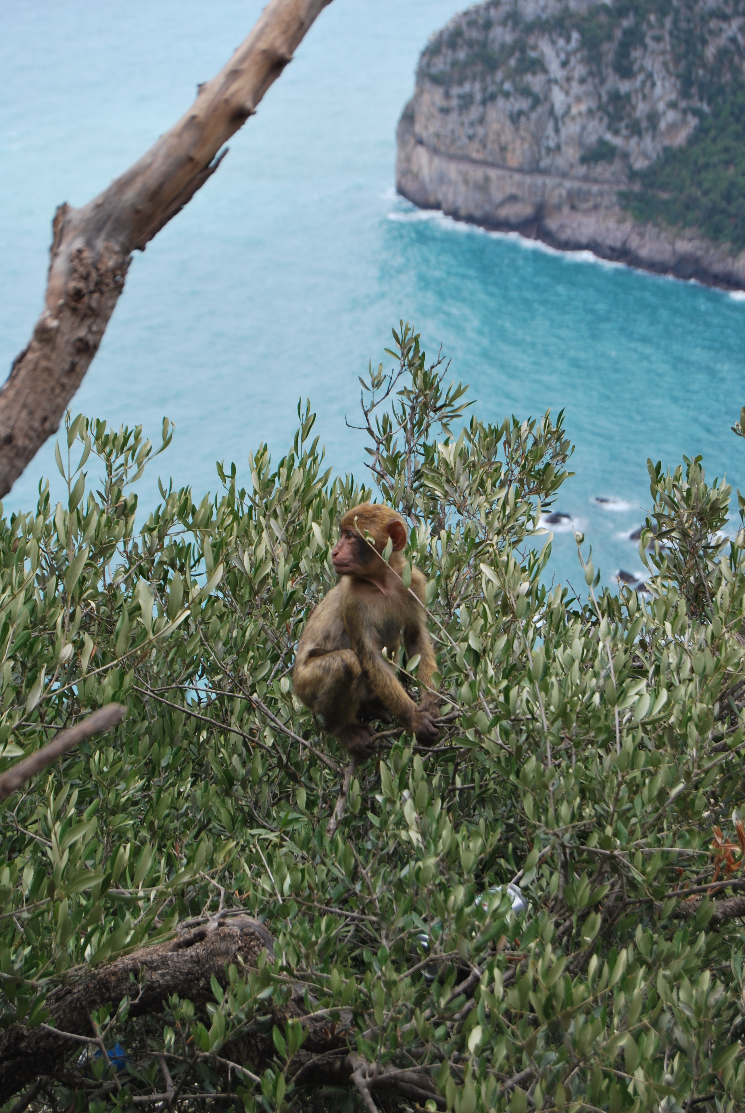 Macaque berbère Macaca sylvanus avec le Zigouat derrière